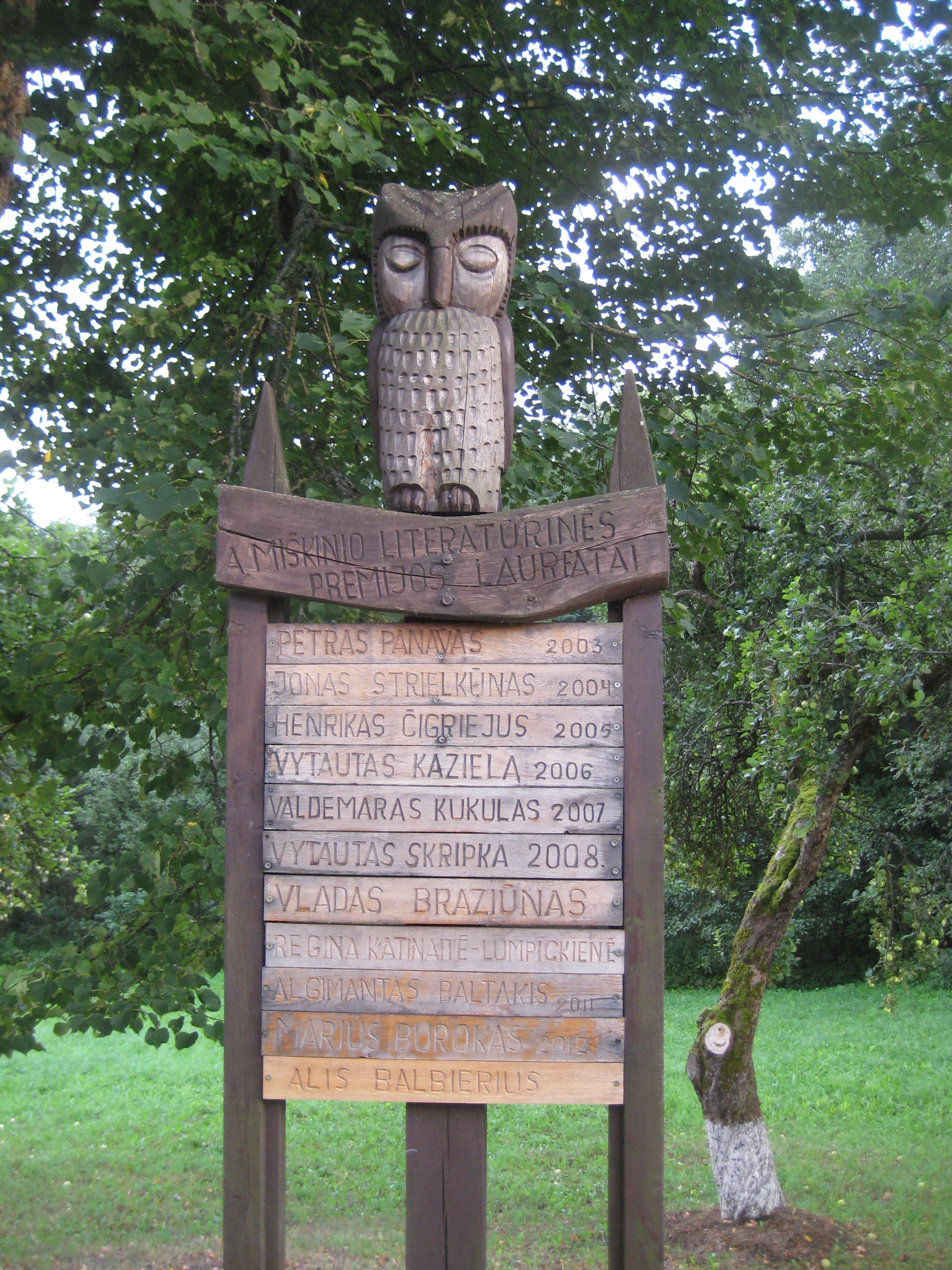 Daugailių sen., Lithuania